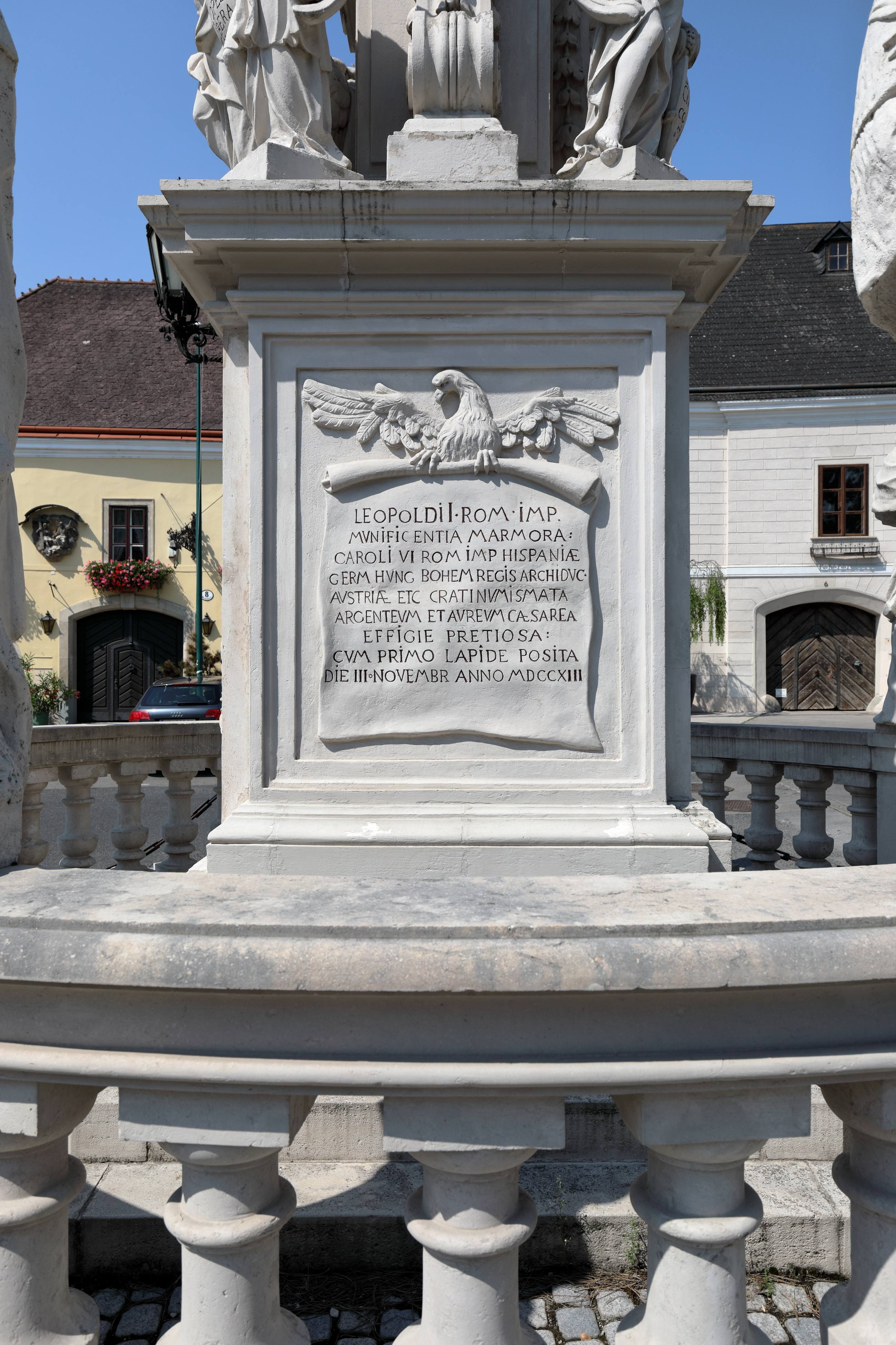 Ostseitige Inschrifttafel am Postament der Dreifaltigkeits- bzw. Pestsäule in der niederösterreichischen Marktgemeinde Perchtoldsdorf.